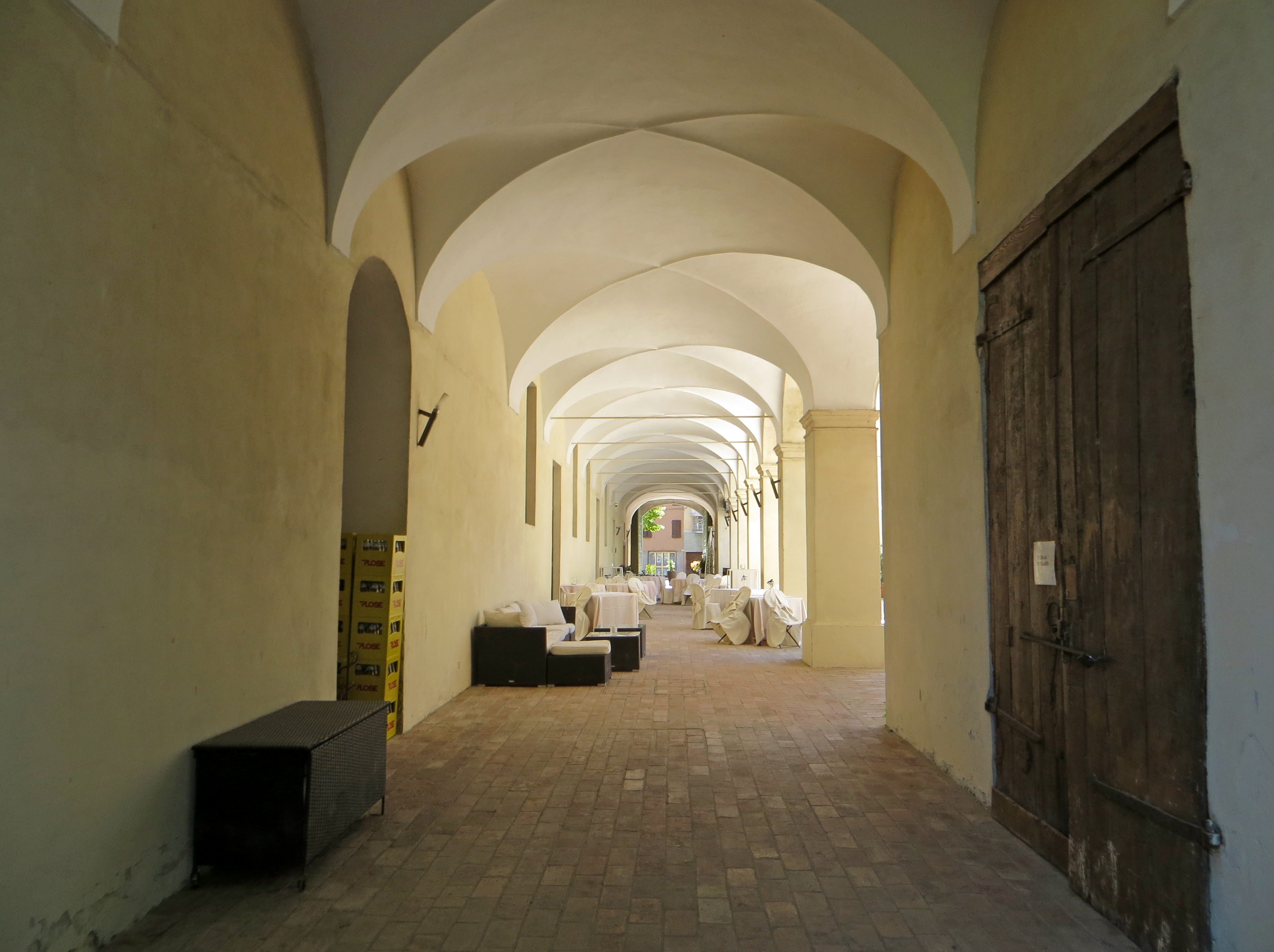 Abbazia di San Bernardo (Fontevivo) - corridoio d'ingresso al chiostro